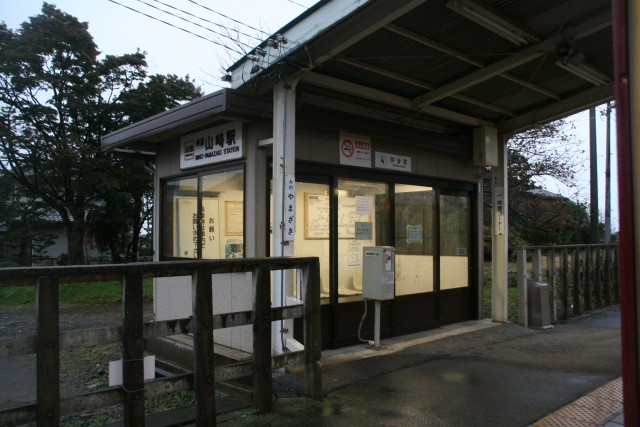 美濃山崎駅